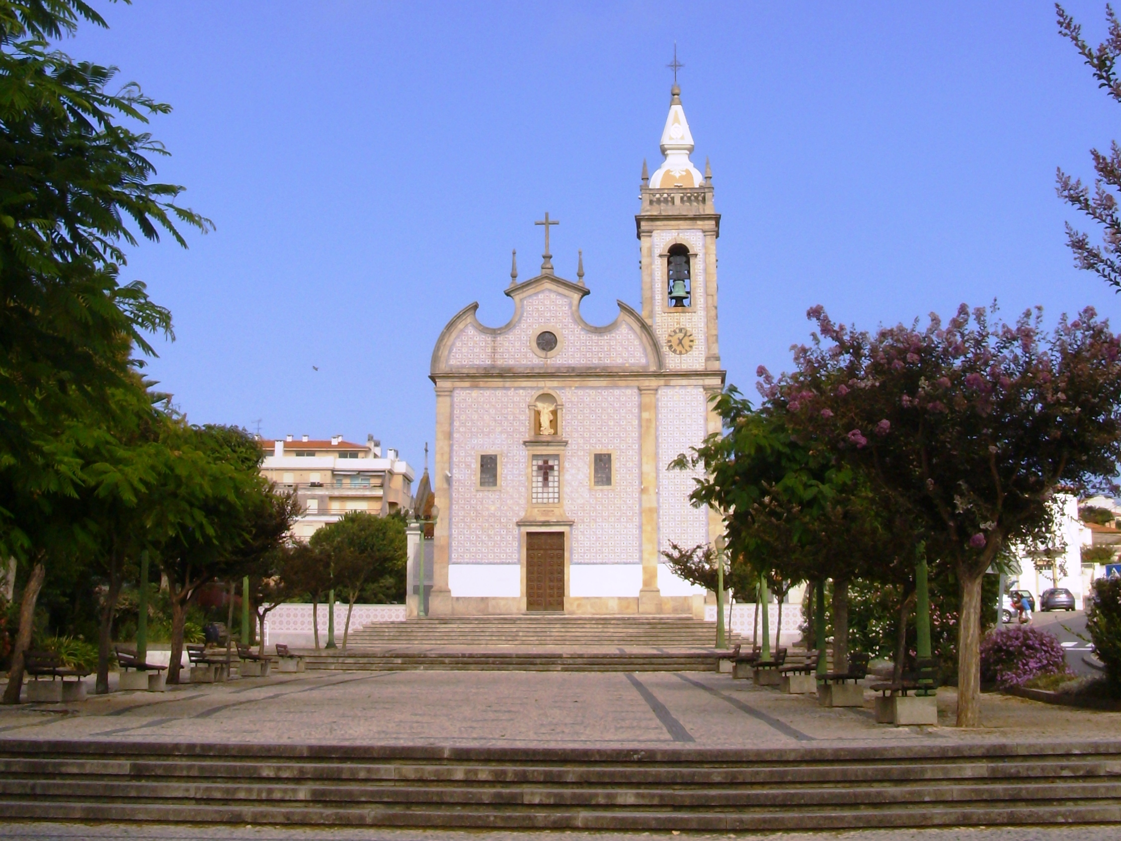 Igreja Matriz de Nossa Senhora da Assunção, Esmoriz, concelho de Ovar, distrito de Aveiro, Portugal.